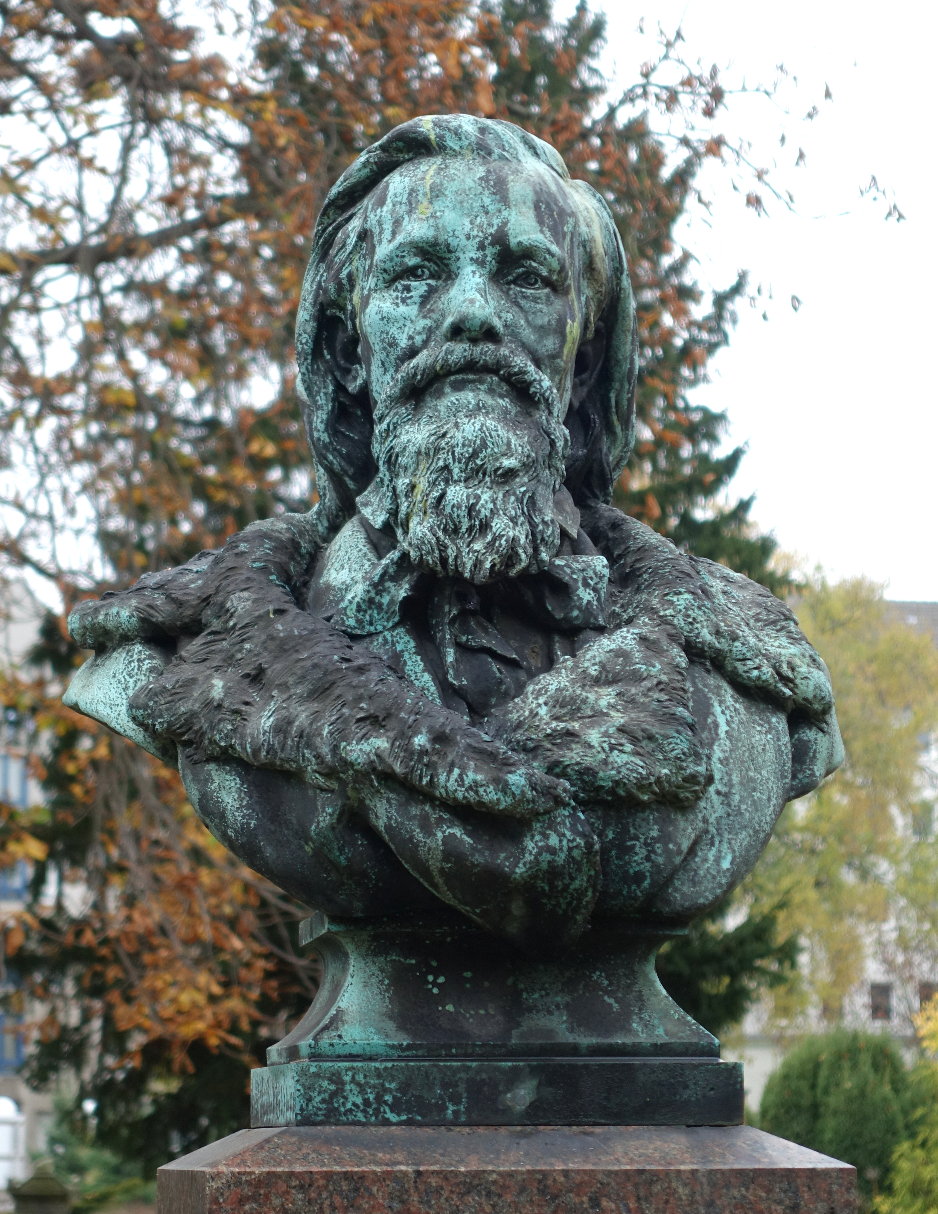 Büste von Alexander Calandrelli auf dem Grabstein von Leopold Arends, Friedhof II der Französisch-Reformierten Gemeinde, Berlin, Germany.